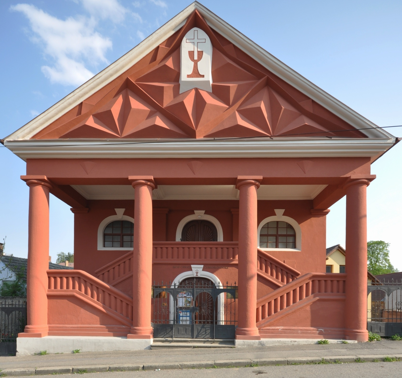 Synagoga (Milevsko)